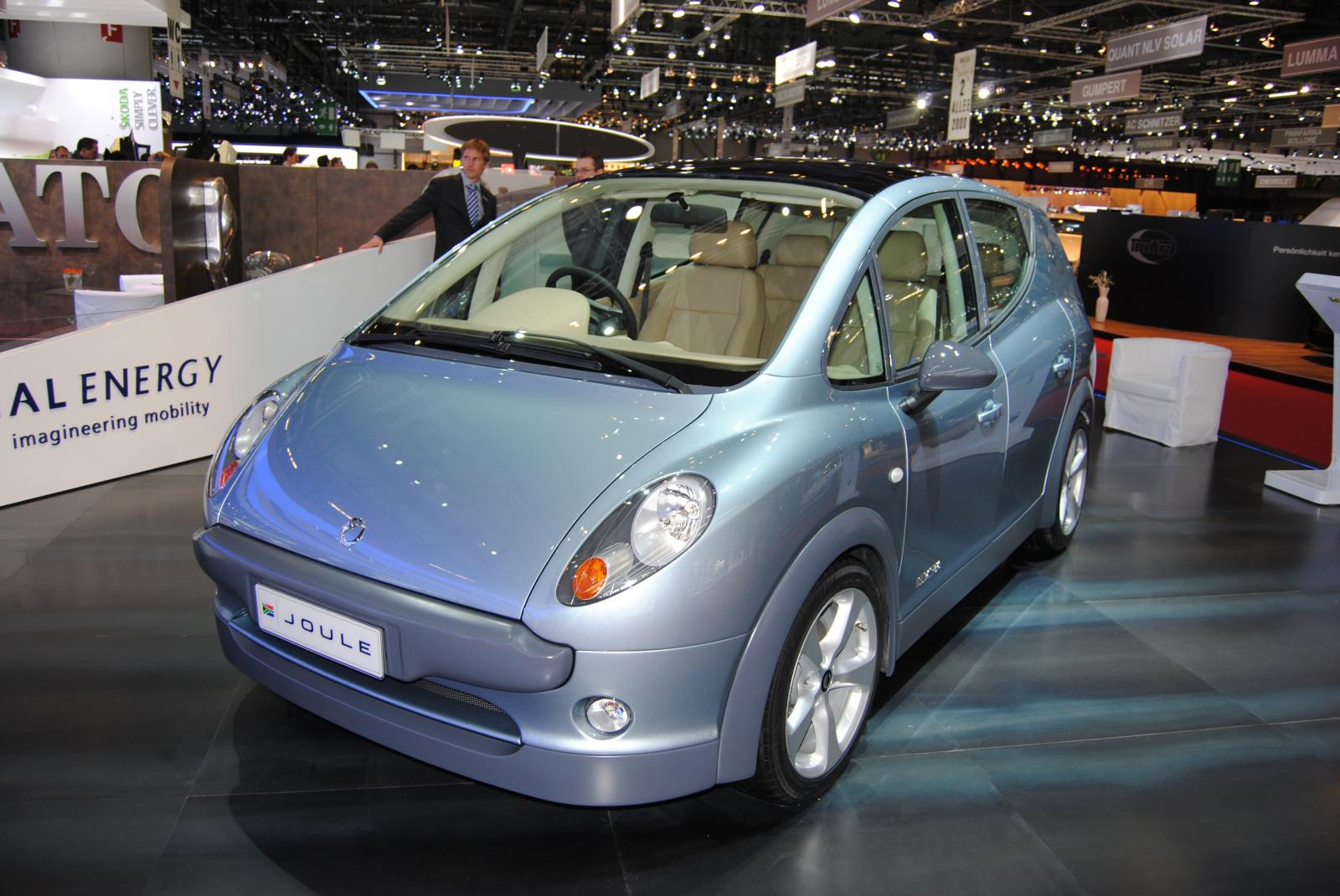 Geneva2010 473